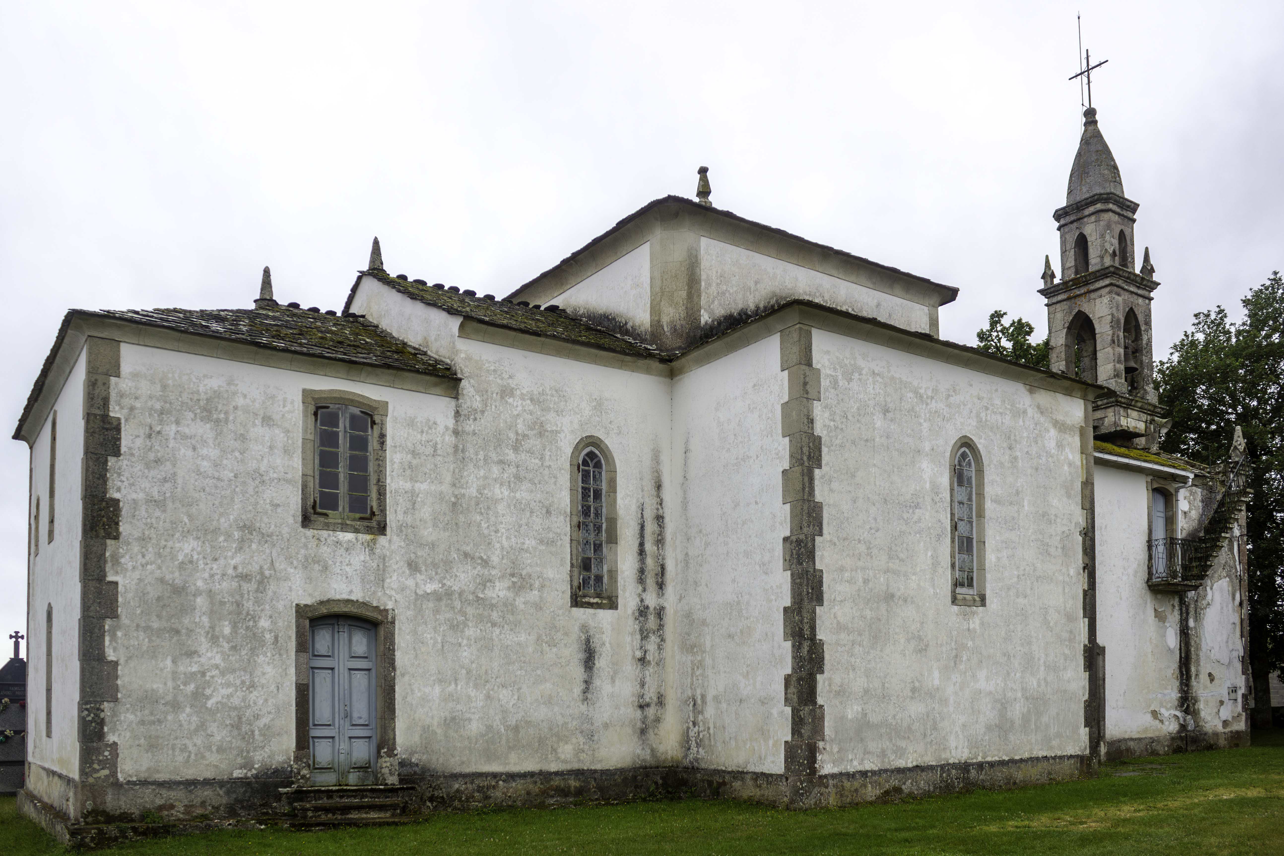 Igrexa de San Pedro de Pígara no concello de Guitiriz.